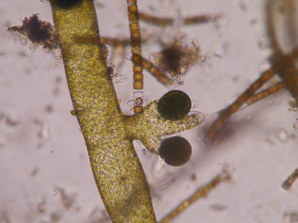 Vaucheria sp：フシナシミドロの有性生殖器官(sexial reproductive organ) coll.:2015/01/10, photo:2015/01/18 incuvated in room temp. 和歌山県田辺市：Tanabe City. Wakayama Pref. Japan